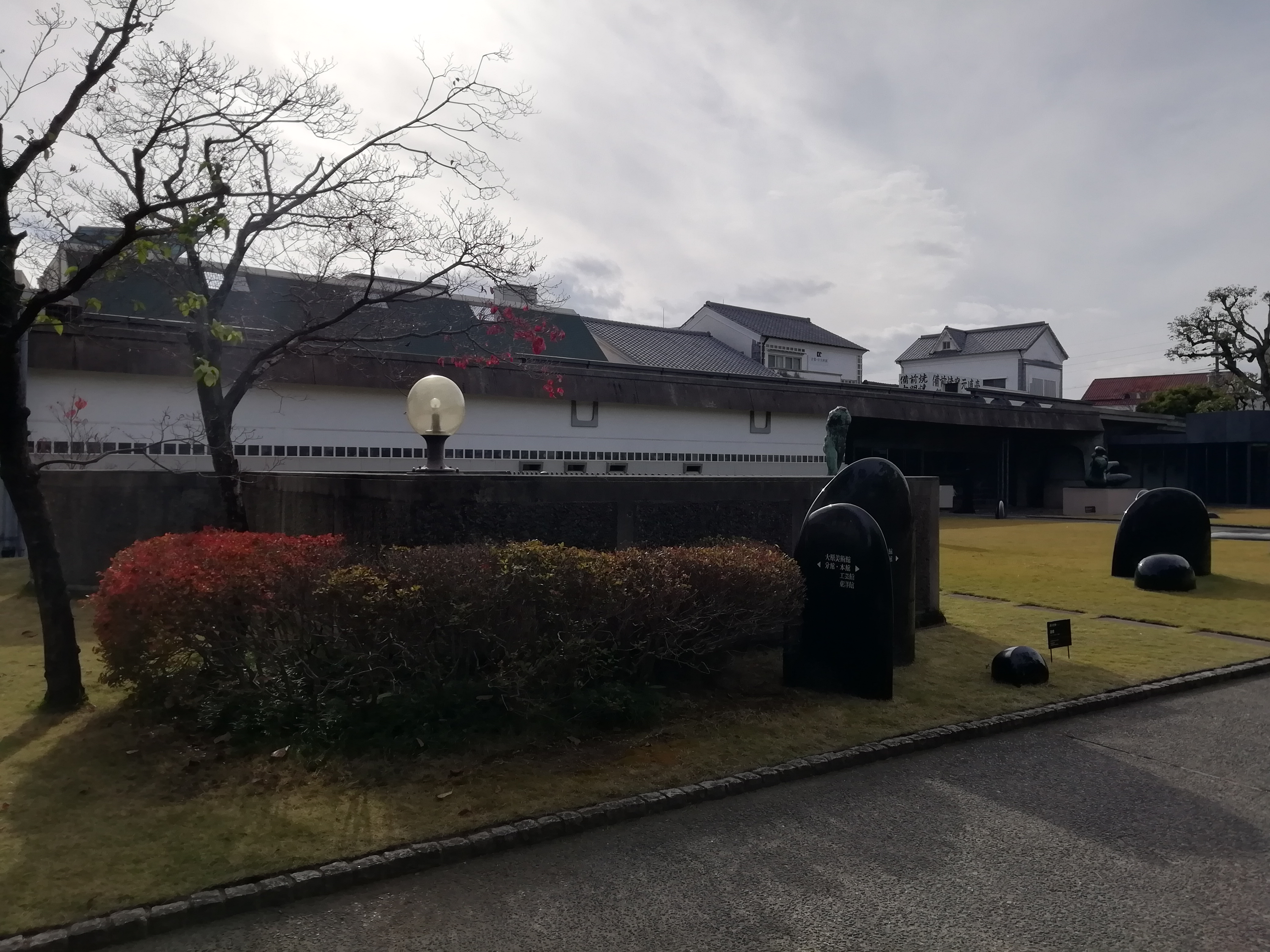 大原美術館分館, 岡山県倉敷市